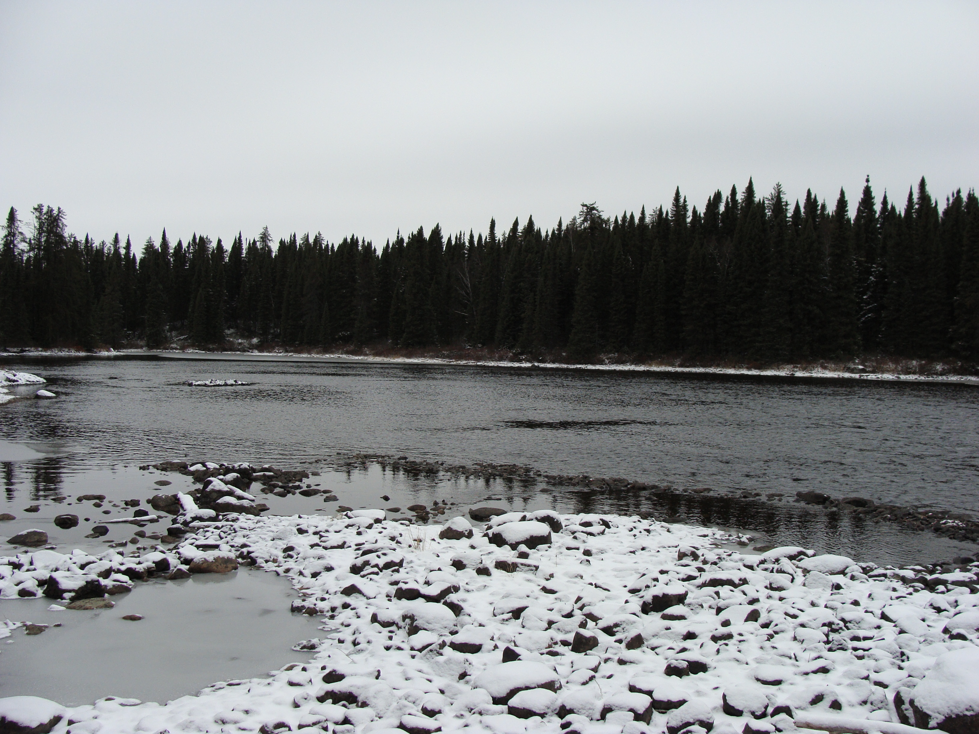 Rivière Obatogamau, près de Chapais (Québec).